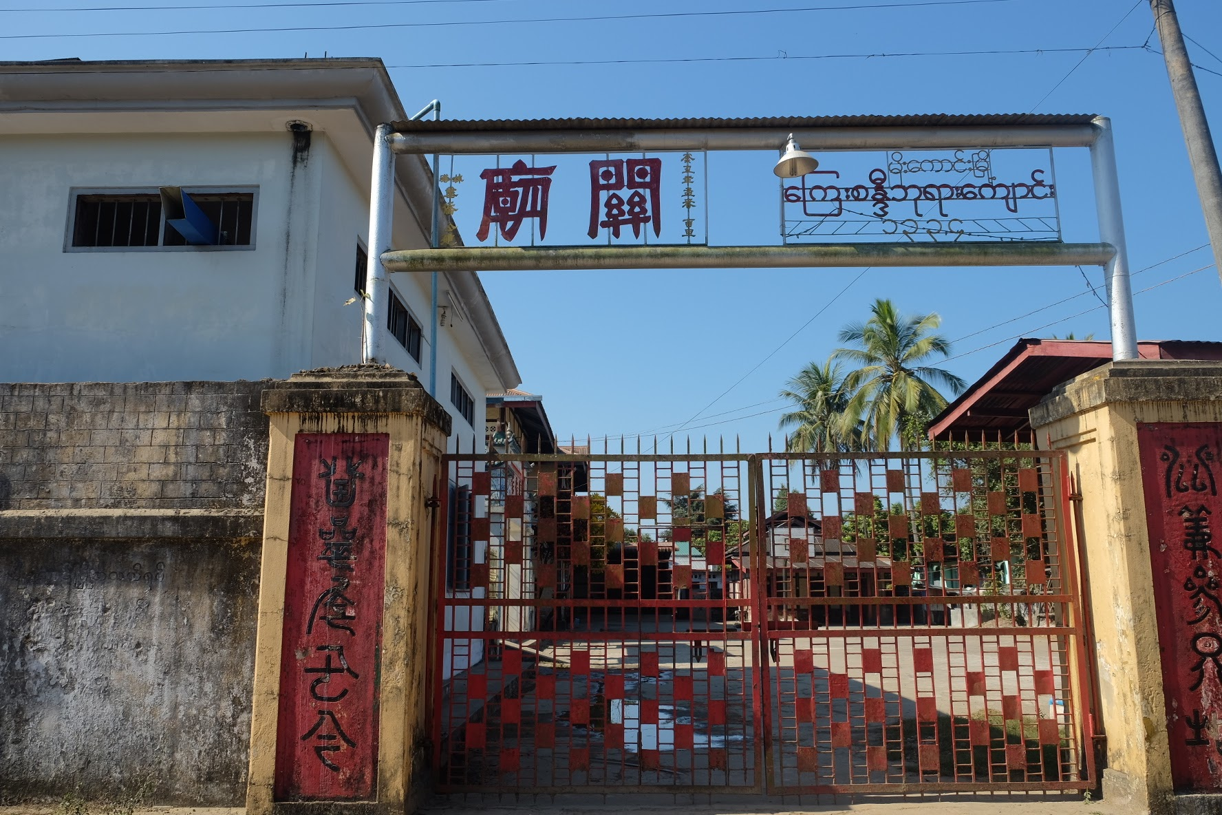 မြန်မာဘာသာ: နန့်ရင်းရပ်ကွက်ရှိ တရုတ်ကြေးစန္ဒီဘာသာရေးကျောင်း